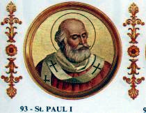 Pope Paul I